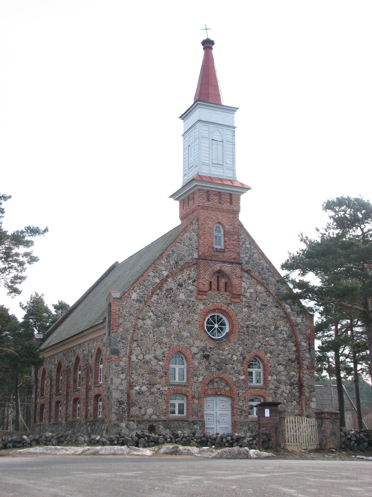 Häädemeeste St. Michaels Church, Häädemeeste, Estonia. Year 2008